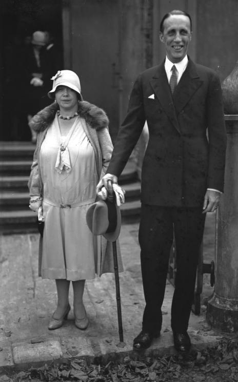 Die Hundertjahrteier der "Kapelle des Heiligen Alexander Newski" auf dem Kapellenberg in der Potsdamer russischen Kolonie! Der russische Grossfürst und Neffe des ermordeten Zaren Gabriel Constantinowitsch mit seiner Gattin Antonia wohnten der Feier bei.